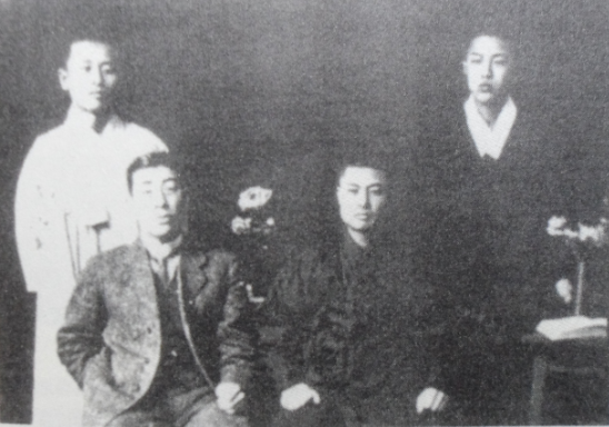 罗云奎二排白衣